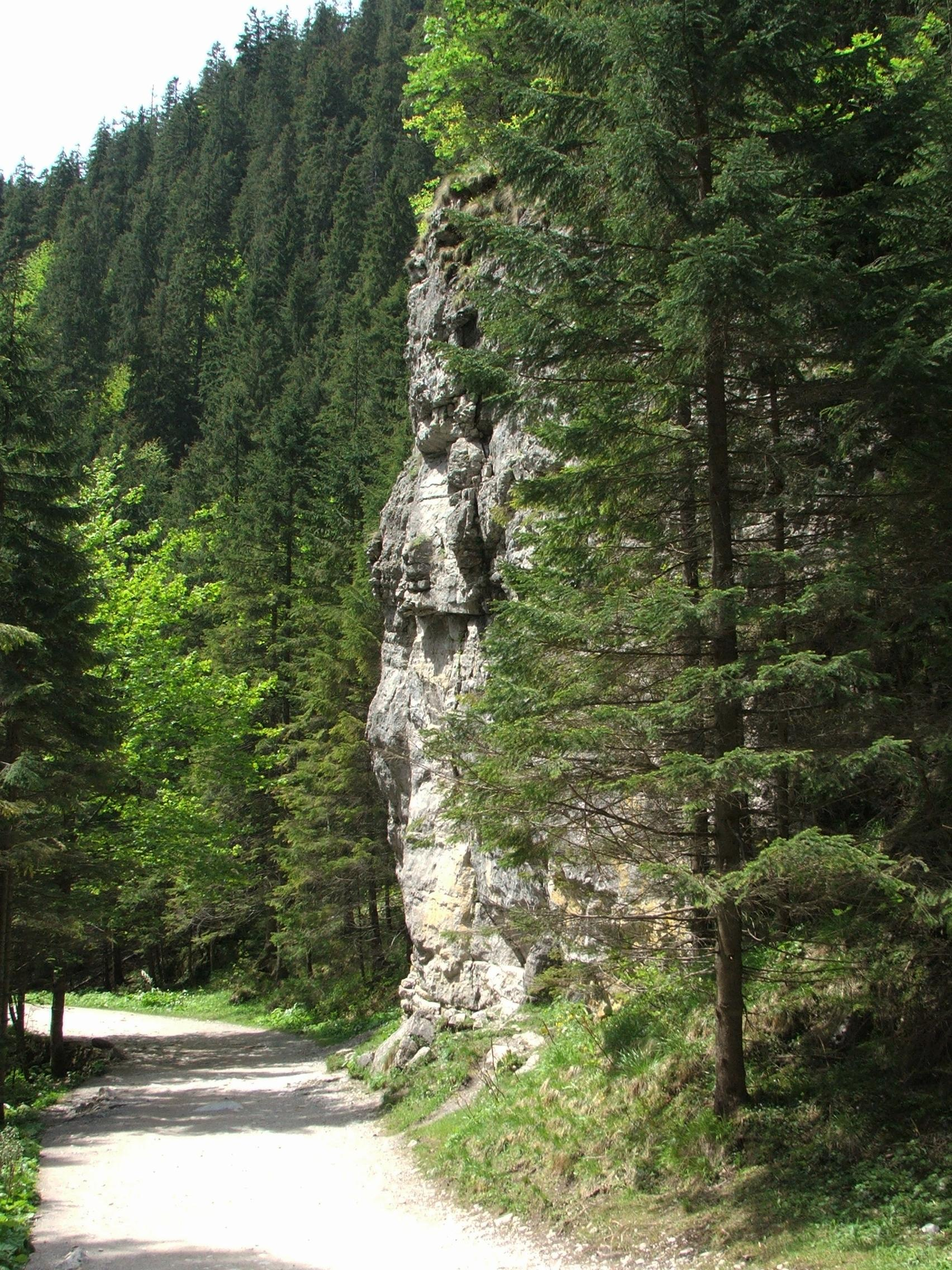 Brama Kraszewskiego (Dolina Kościeliska)